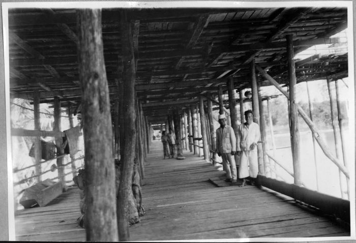 Negatief. Modang-radja Mas Ardjo en zijn neef Adhi Bleh op de galerij onder de woonkamers van de Lamin Long Bleh aan de Belajan te Kutai, Borneo